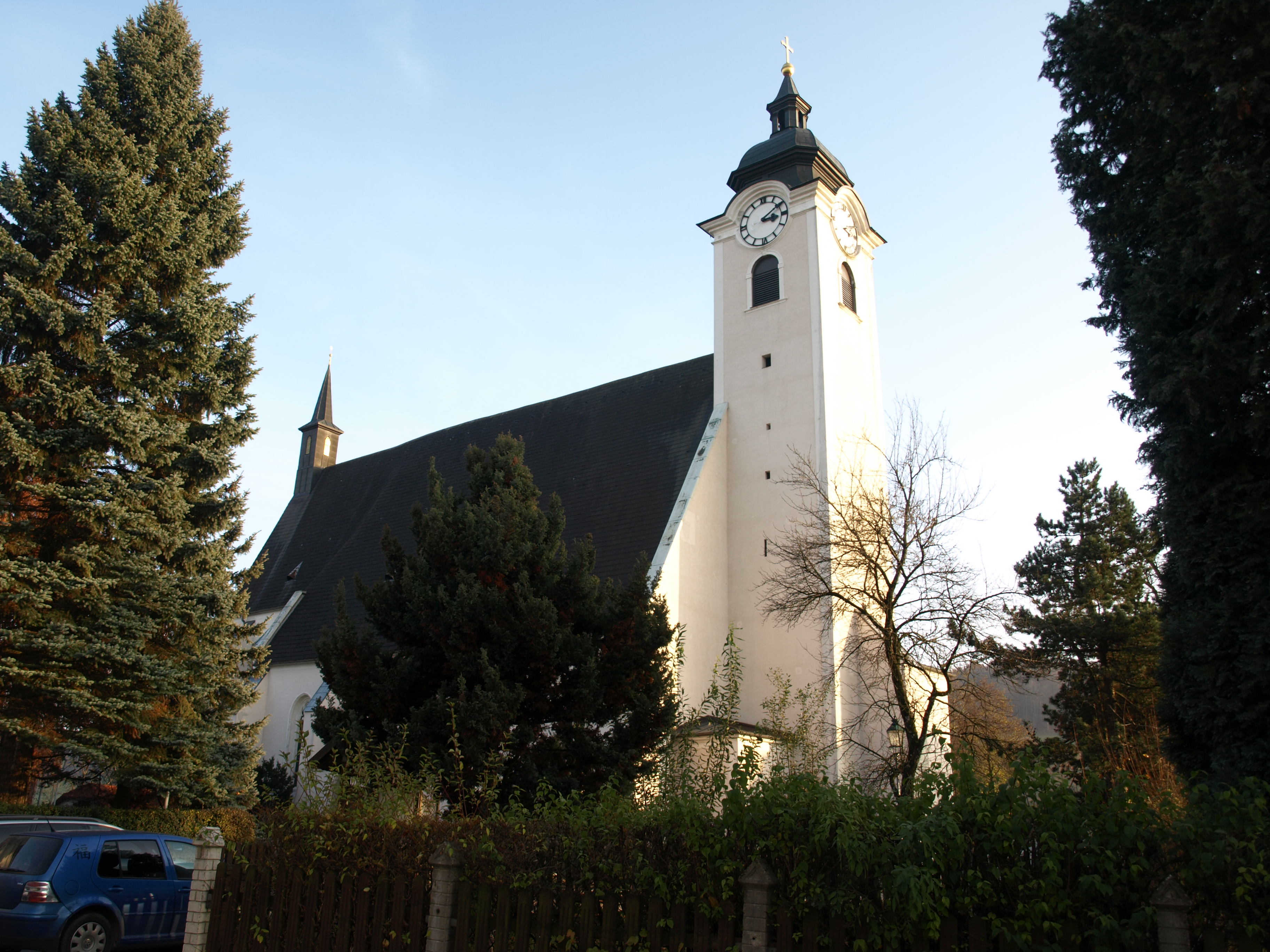 Kath. Pfarrkirche Mariae Himmelfahrt